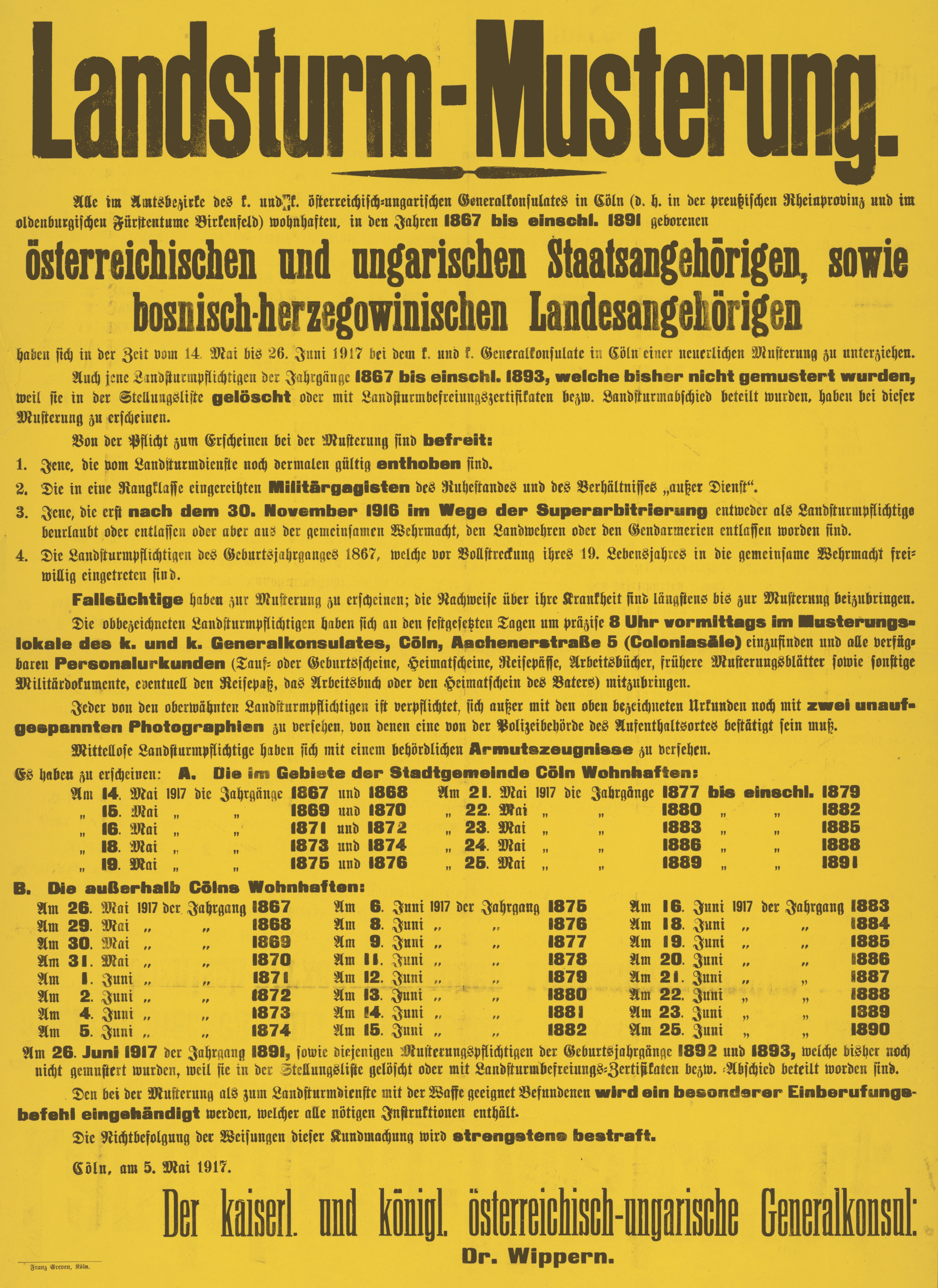 Musterungs-Aufforderung für die Geburtsjahrgänge ab 1867: Landsturm im Ersten Weltkrieg. Ausgestellt vom Österreichisch-Ungarischen Generalkonsul in Köln Dr. Wippern